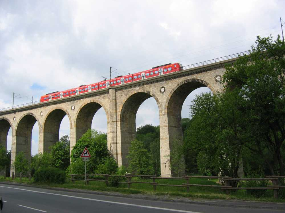 Der Viadukt von Altenbeken, eigenes Bild, copyright: GNU FDL